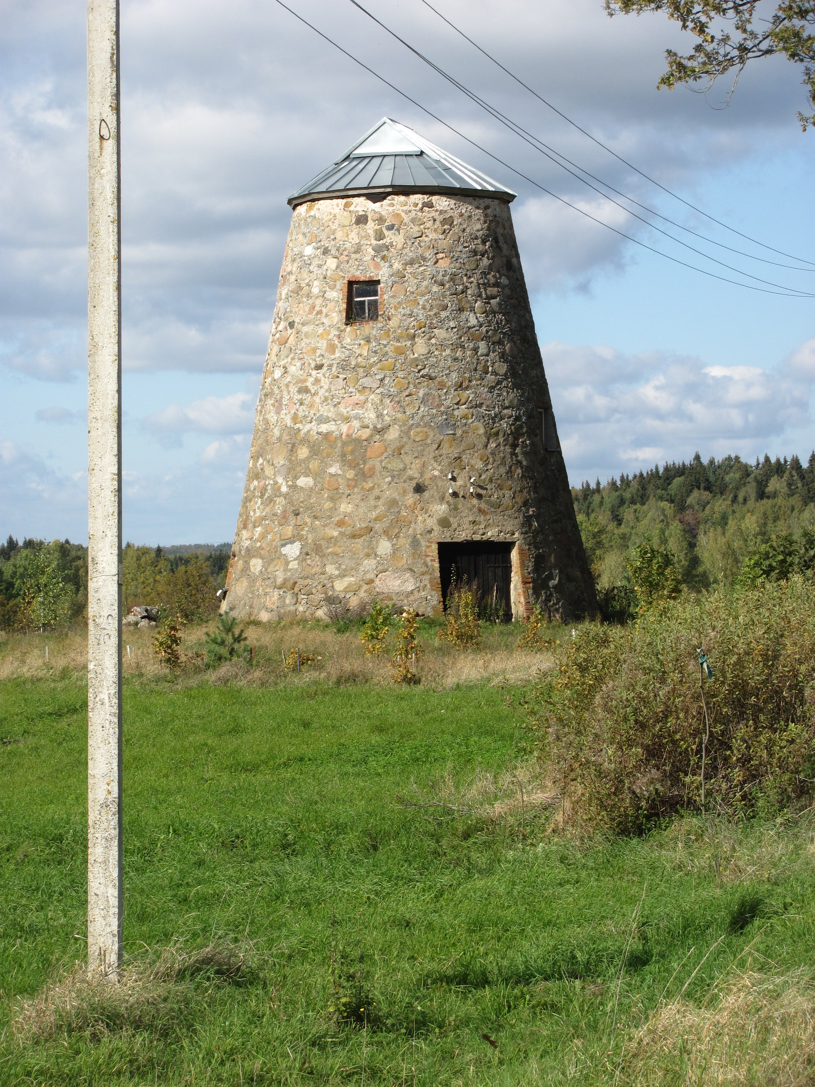 Obelių sen., Lithuania